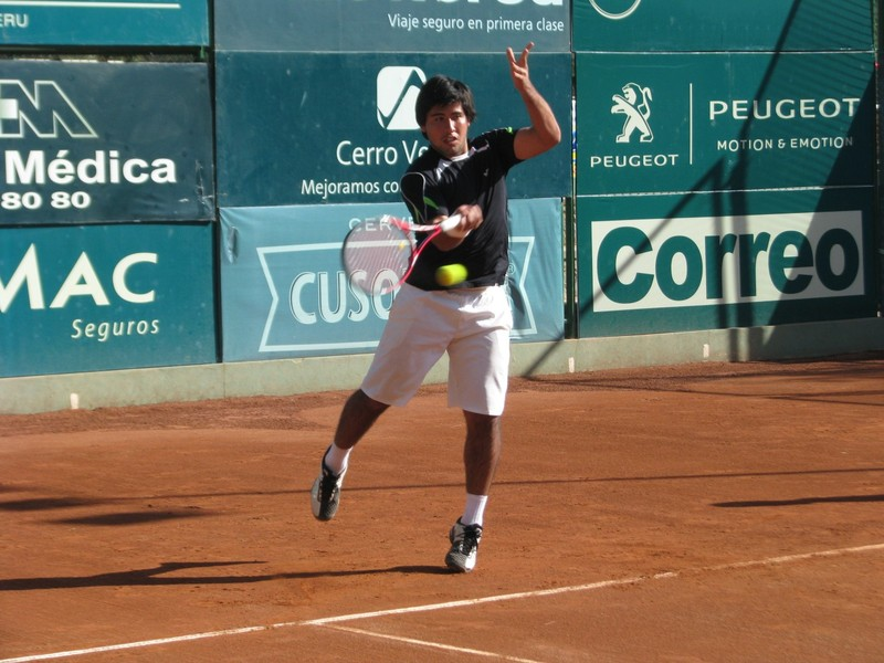 Sergió Galdós ejecutando su forehand contra el boliviano Boris Arias, cuyo partido fue favorable al peruano por 6-3, 3-6, 7-6 (9) en la segunda ronda del Peru F1 de 2011 en Arequipa